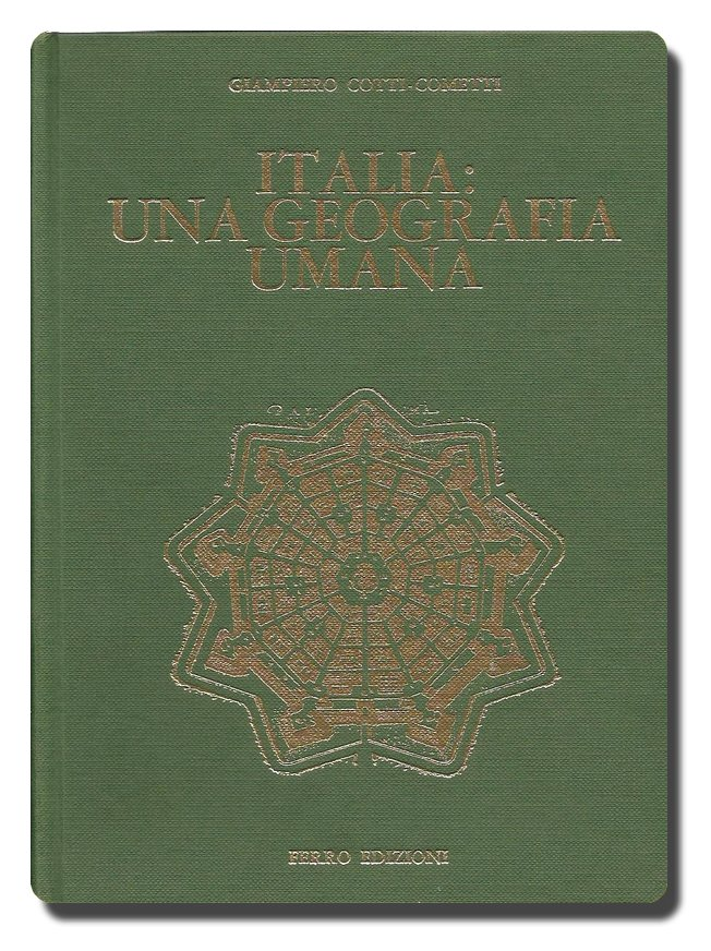 Copertina del libro 'Italia: una geografia umana',Ferro edizioni